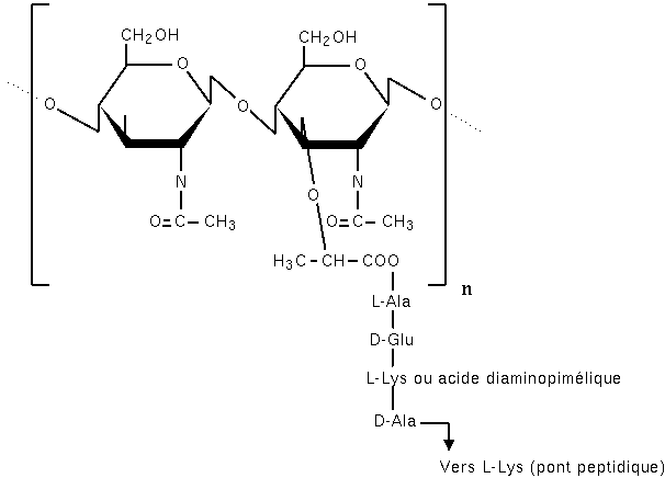 Peptidoglycane